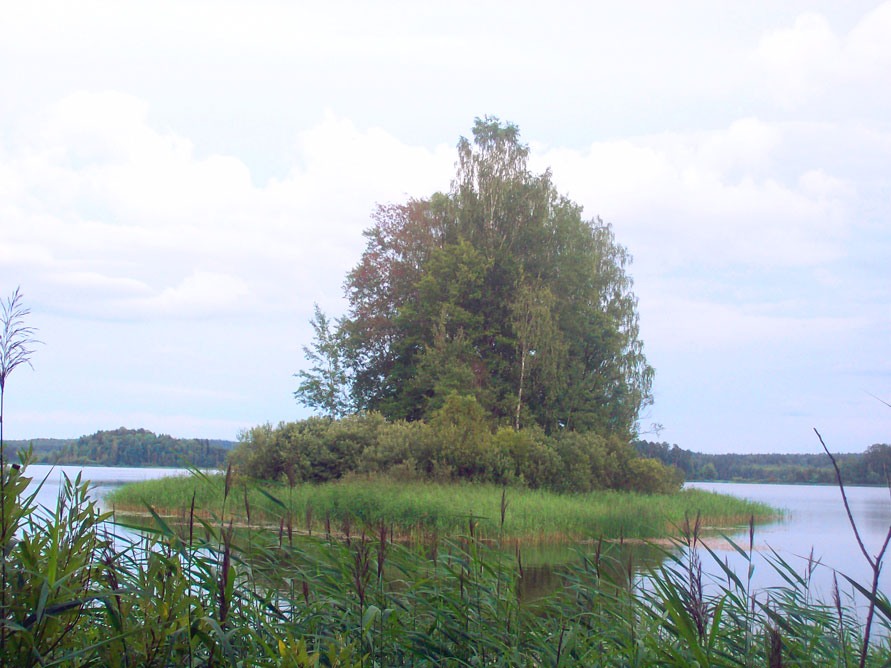 остров Любви